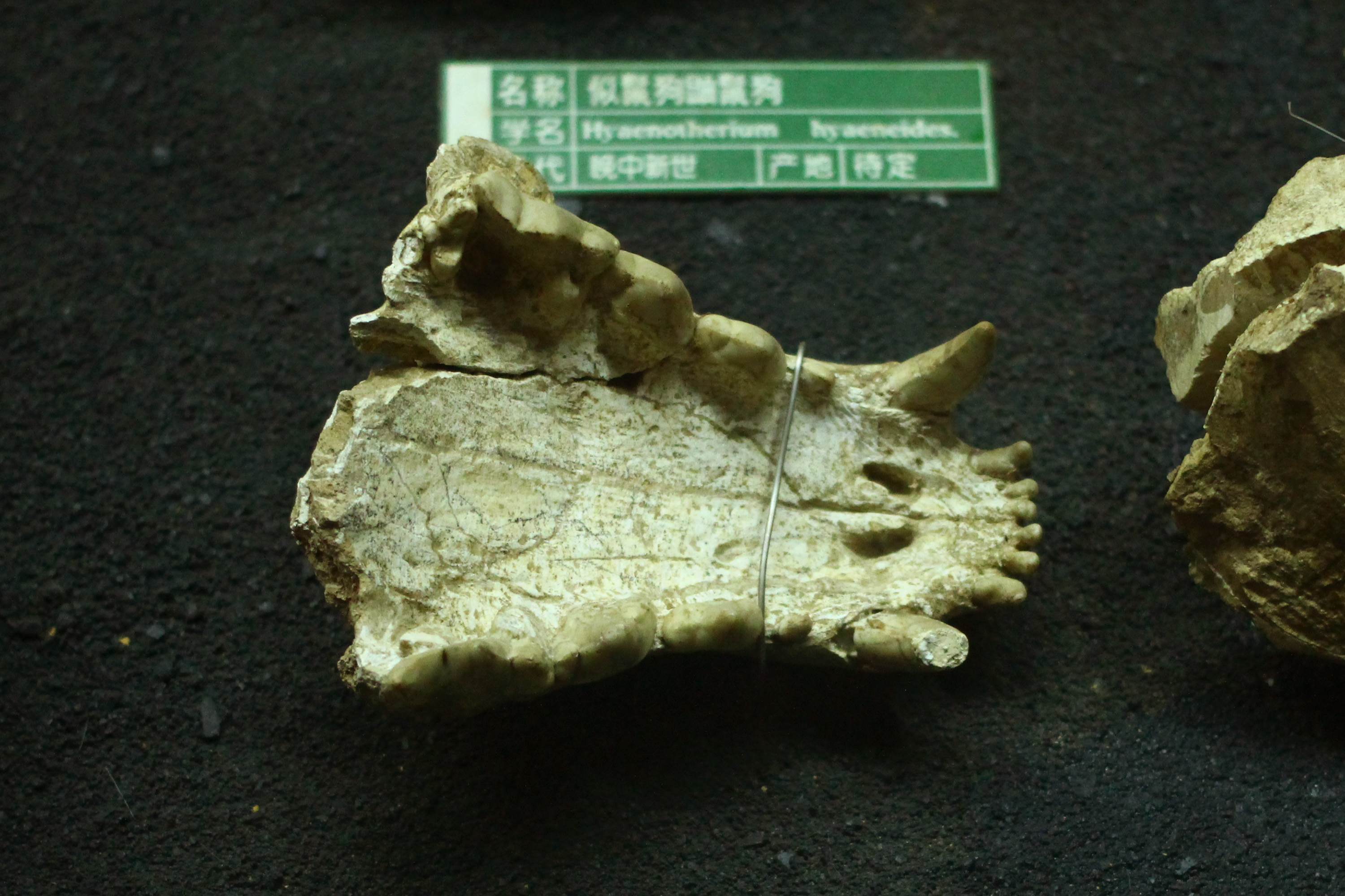 鼬鬣狗 Thalassictis hyaenoides。晚中新世。